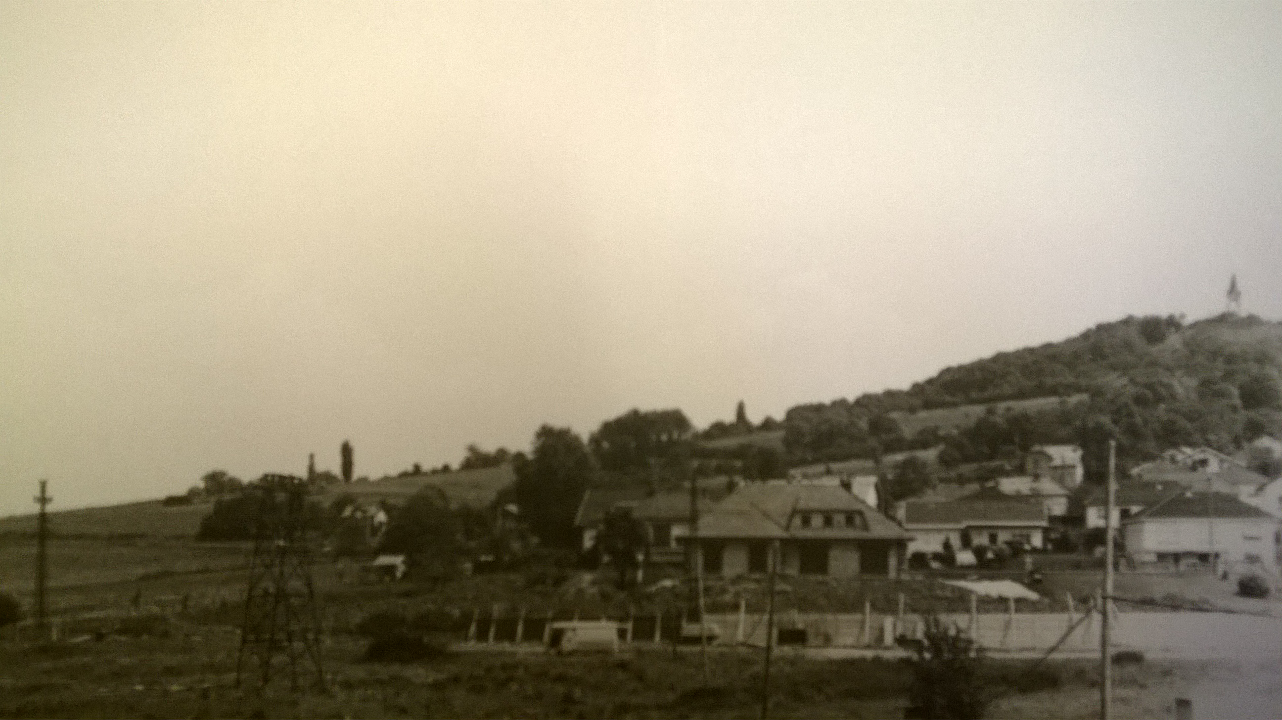 Le quartiers des Haberges de Vesoul dans les années 1980